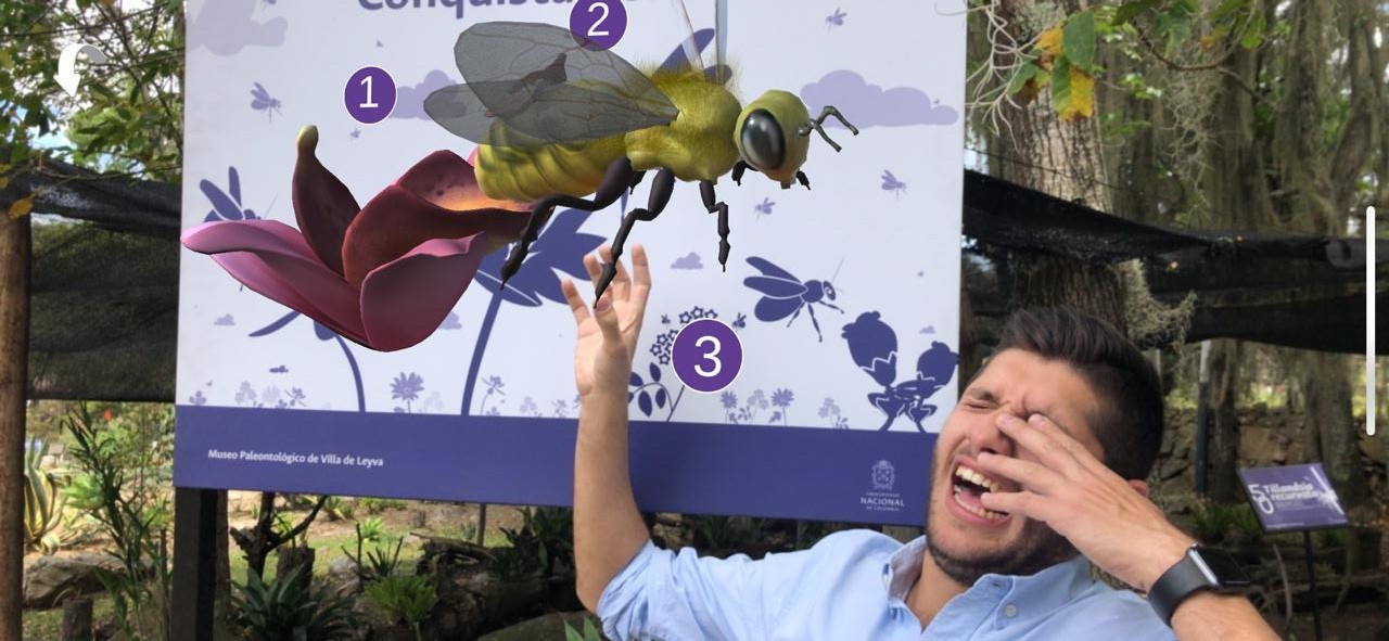 Realidad aumentada museo paleontológico de Villa de Leyva